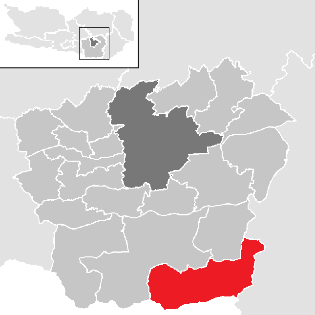 Bezirk Klagenfurt-Land